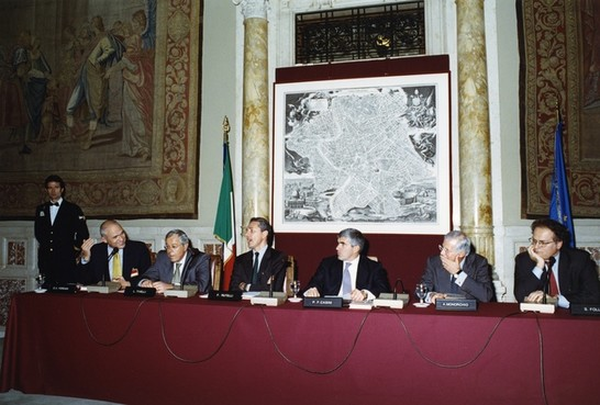 Presentazione del libro di Monorchio e Tivelli "Viaggio italiano: vizi e virtù dell'Italia in Europa"